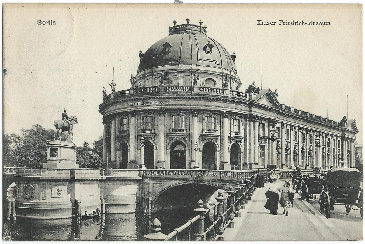 Vue de Berlin au début du XXe siècle (carte postale).